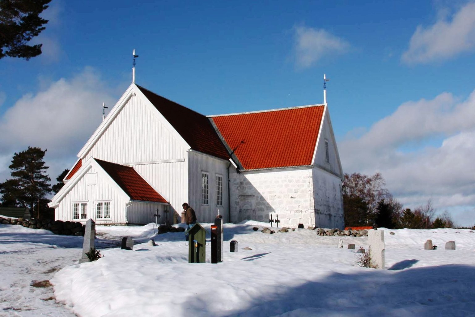 Tromøy kirke fra sjøsiden